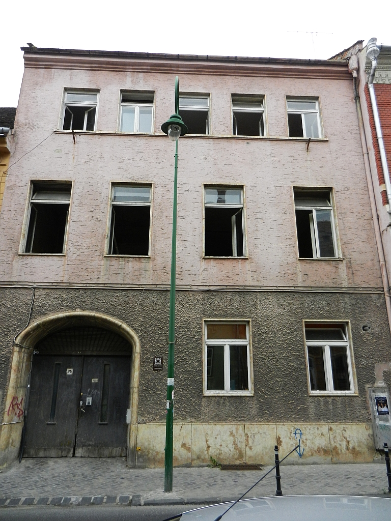 Casă monument istoric